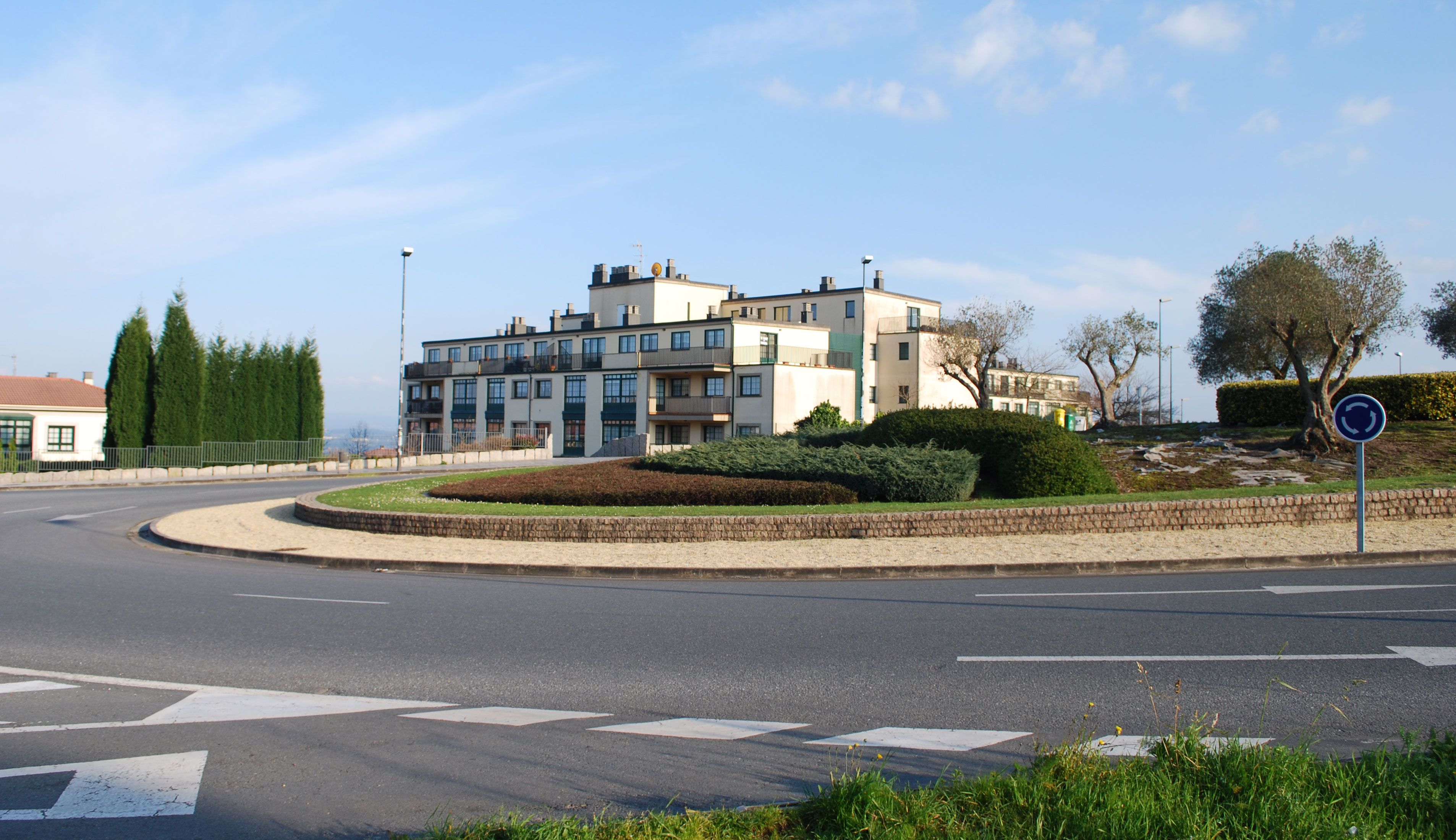 A Zapateira A Coruña Galiza Spain